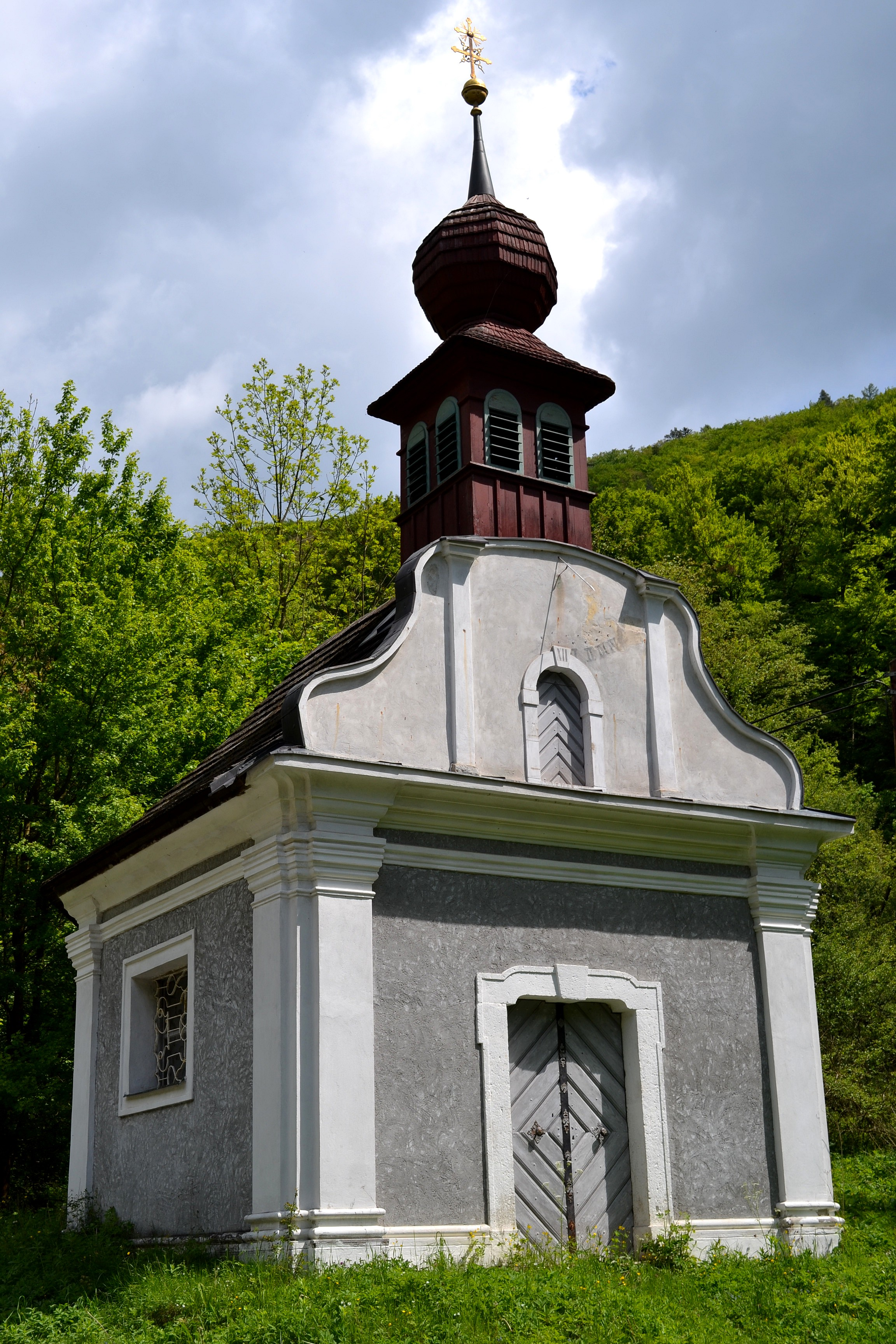 Baroková kaplnka svätého Michala bola po celkovej rekonštrukcii vysvätená 17. júna 2003